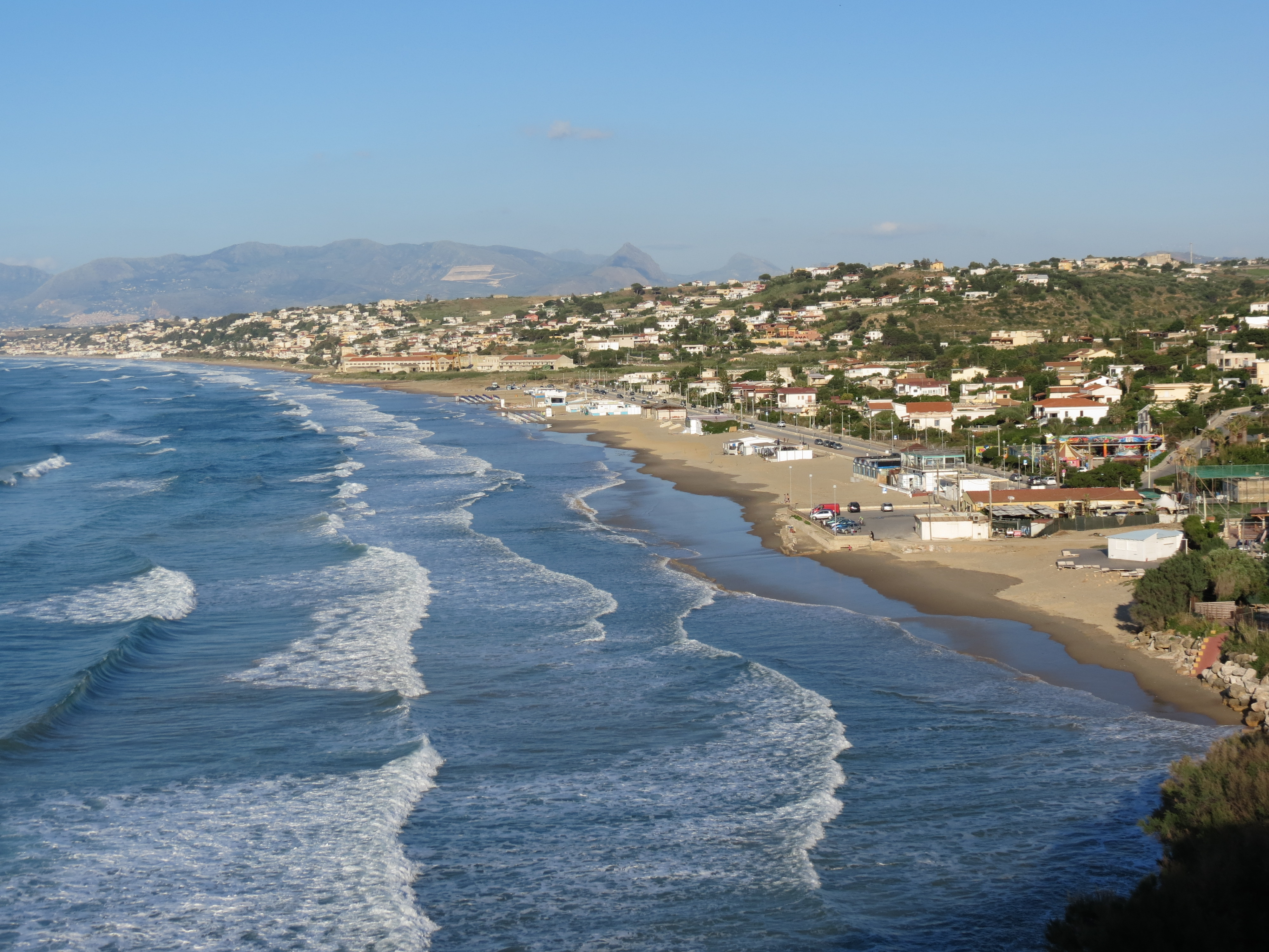 Vue de la Sicile.